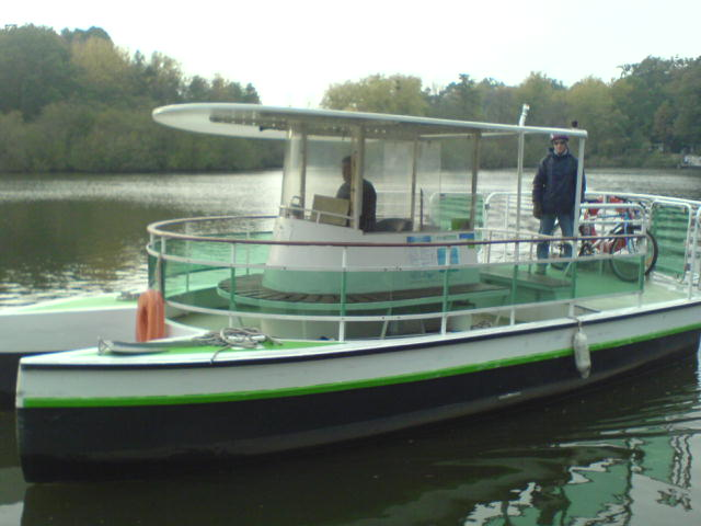 La Mouette accoste à Port-Boyer